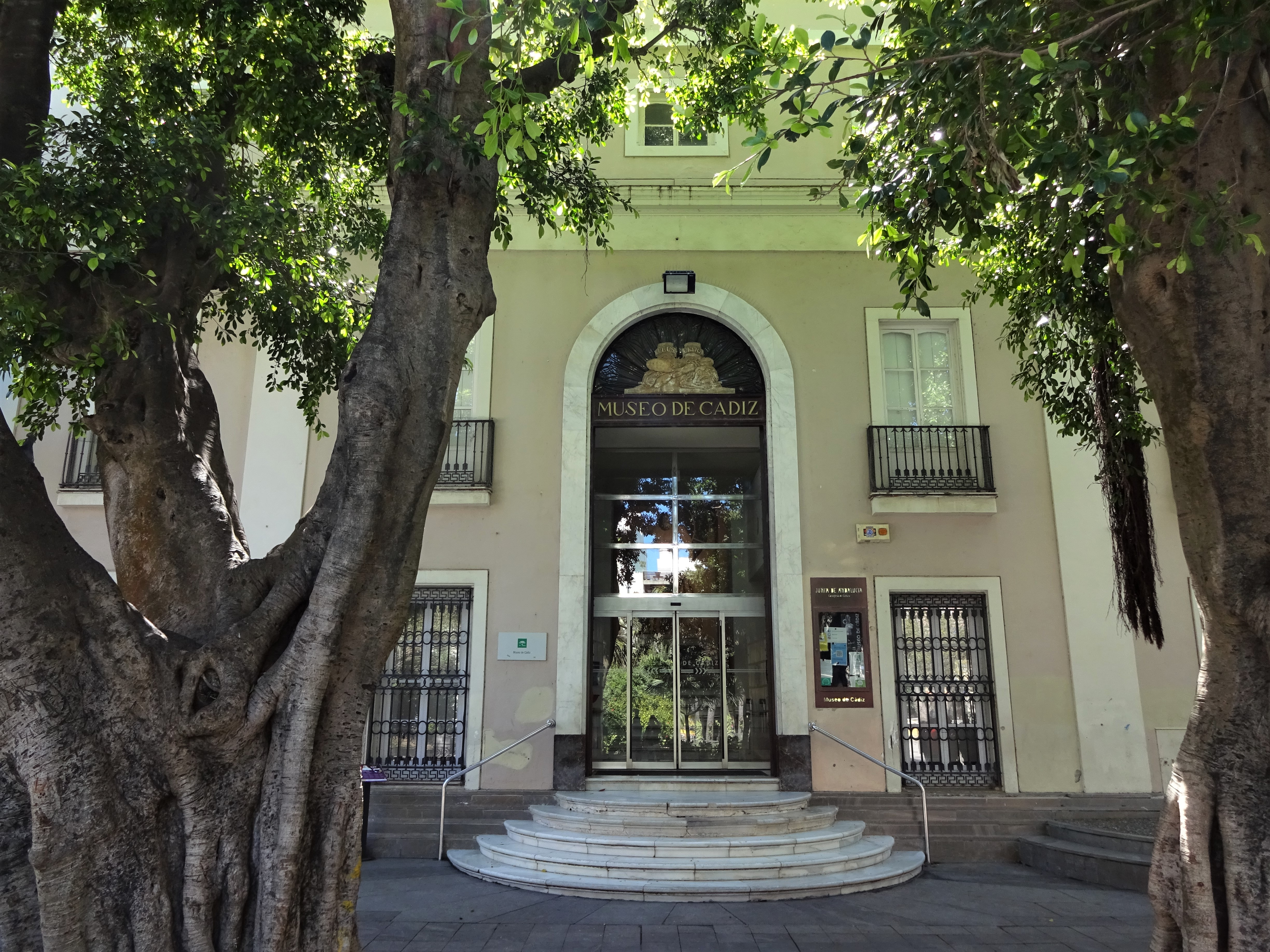 Eingang des Museums von Cadiz